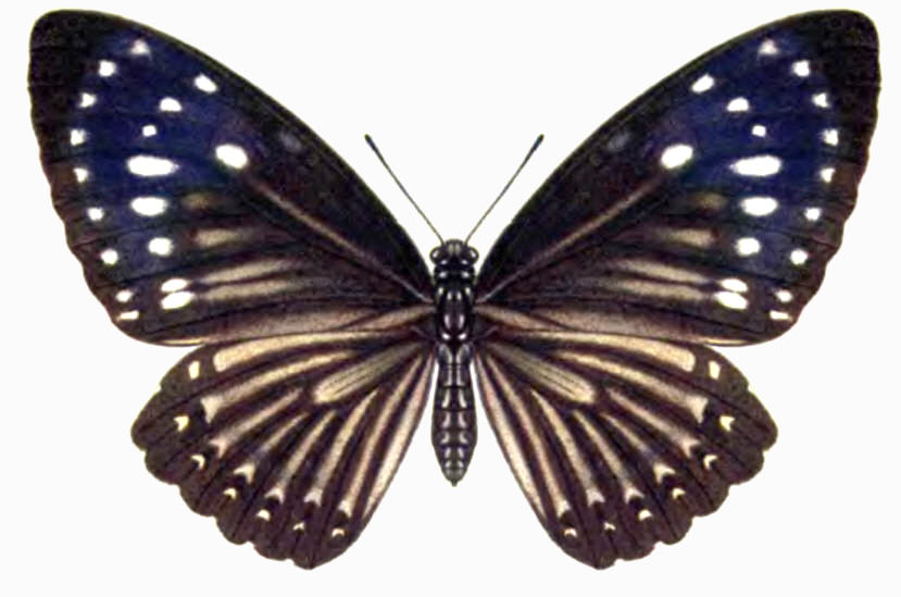 Papilio paradoxa (Zincken, 1831)